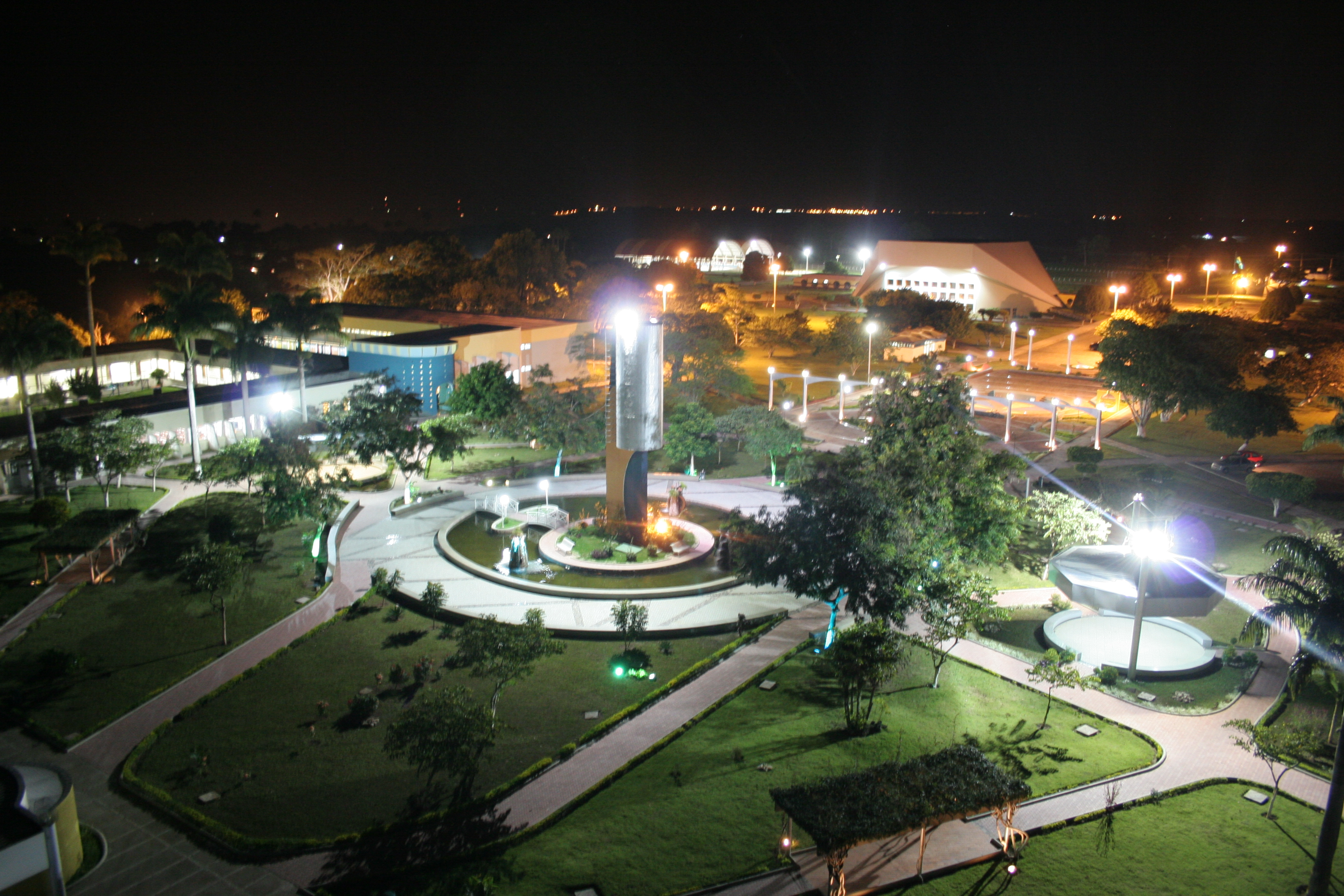 Vista noturna do campus das Faculdades Adventistas da Bahia